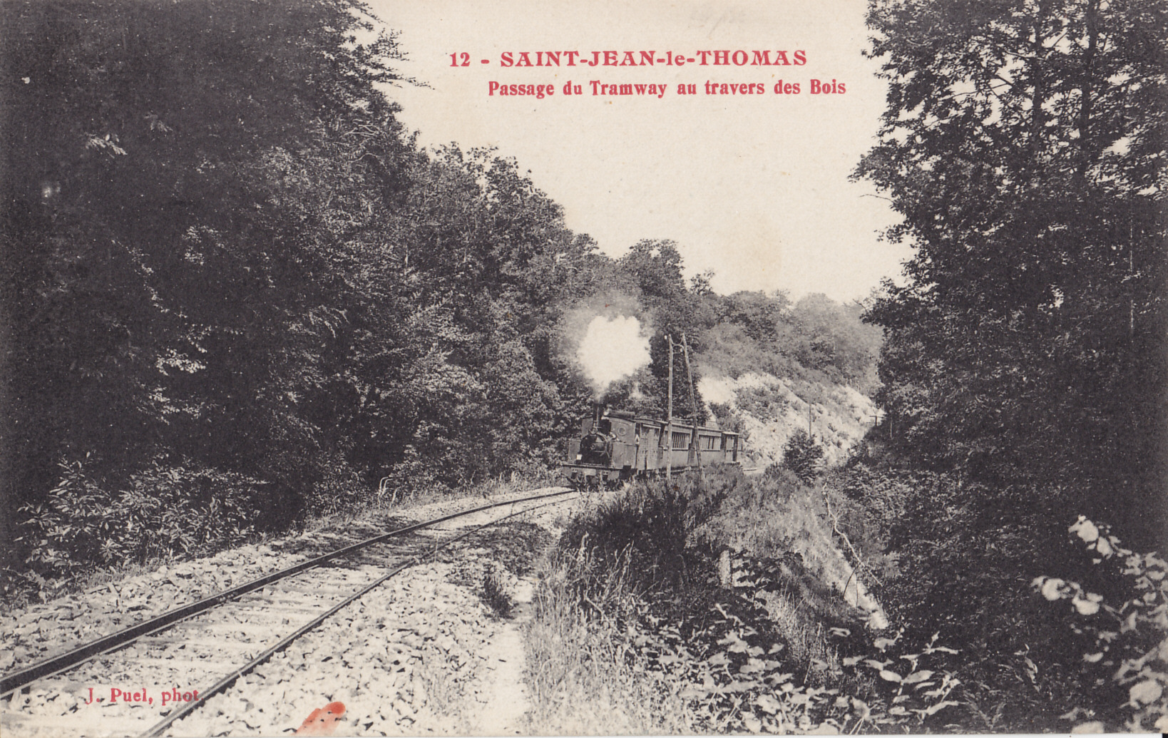 Carte postale ancienne éditée par J. Puel, n°12 : SAINT-JEAN-le-THOMAS - Passage du Tramway au travers des Bois